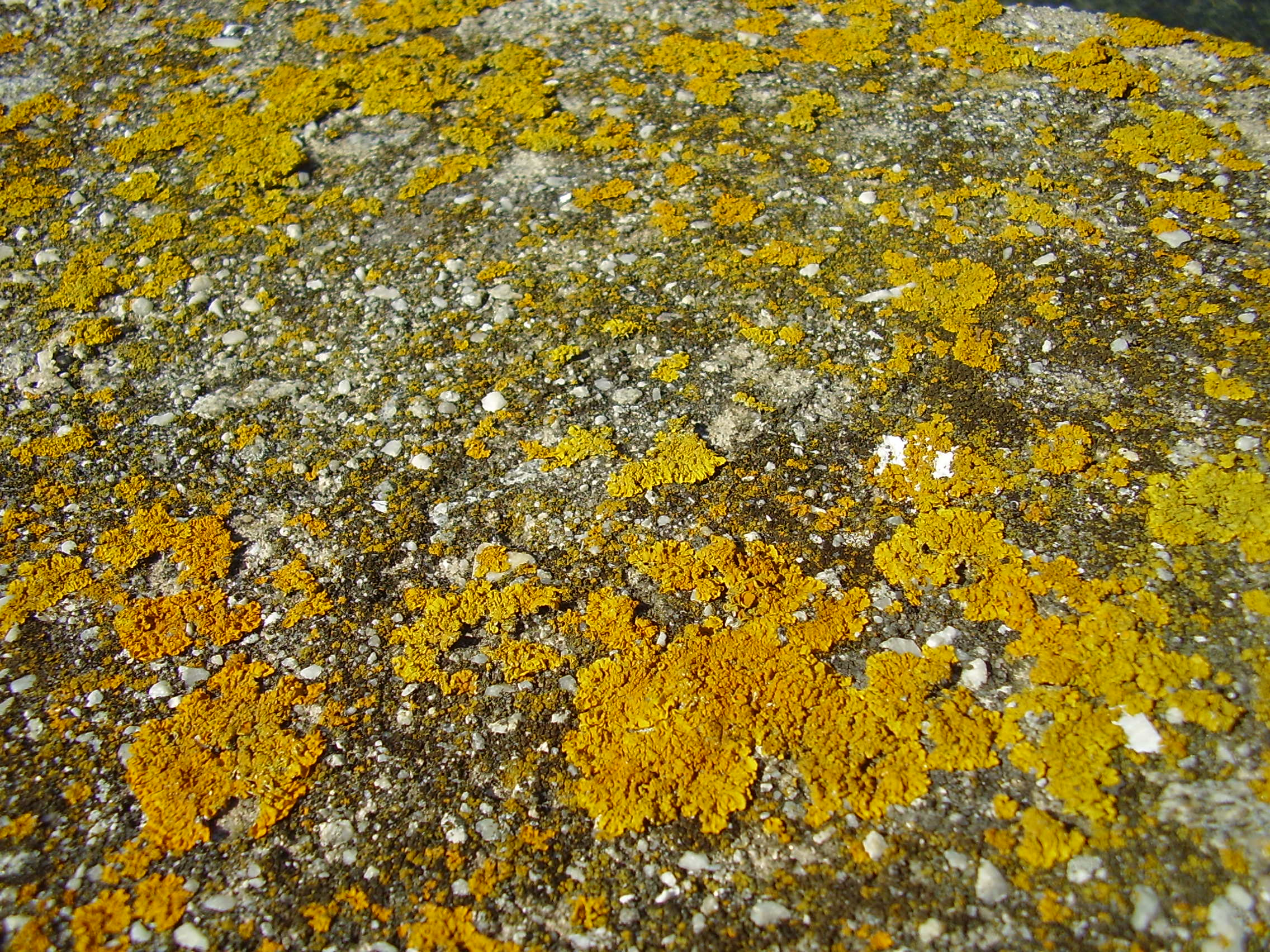 Roscoff, Bretagne; Frankreich